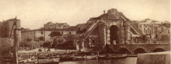 La Porta Ligny di Ortiga, ingresso dell'isola in epoca spagnola. Edificata nel 1673 e demolita nel 1893.